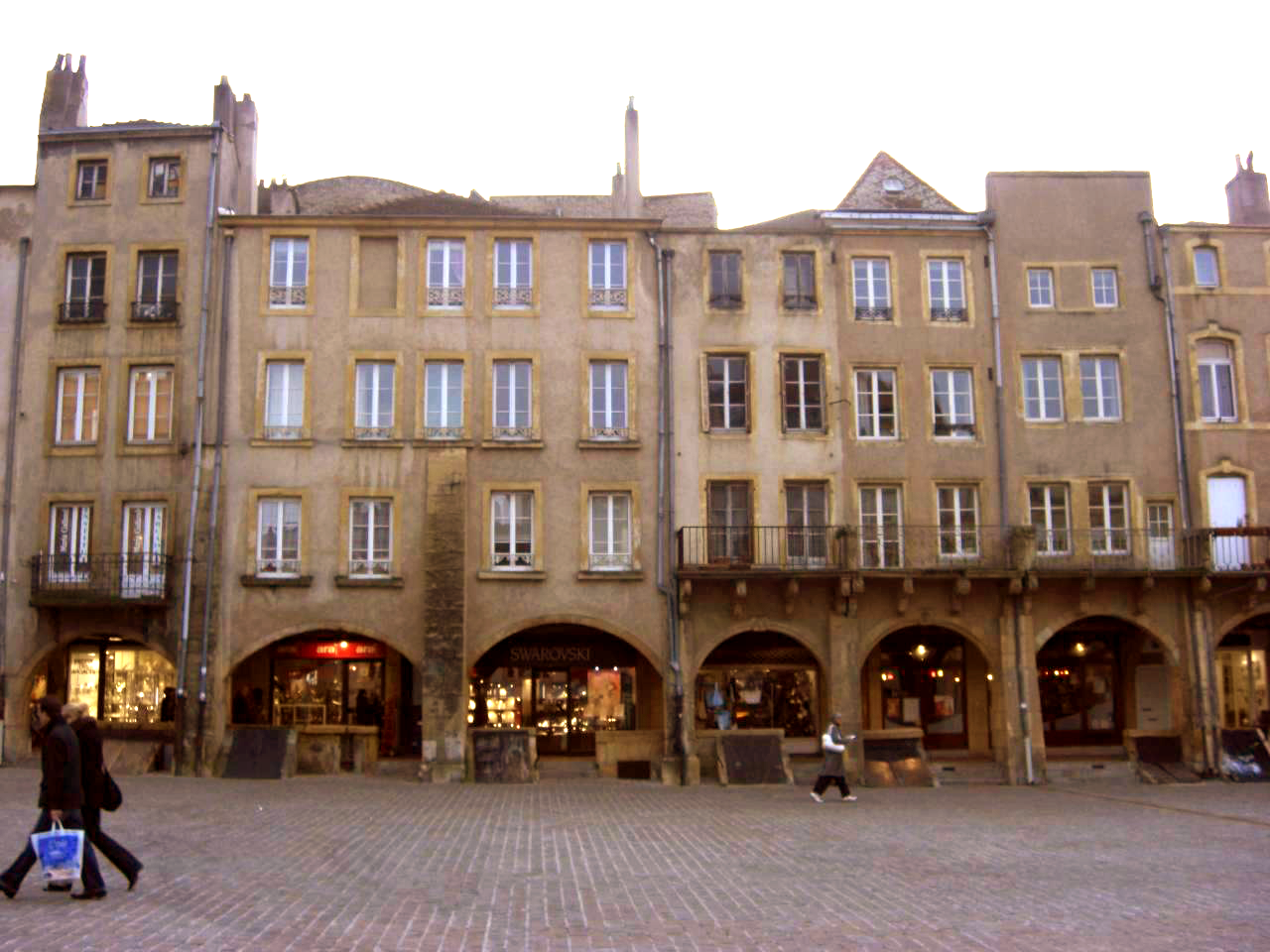 Place Saint-Louis à Metz. À l'arrière de la deuxième façade, le mur de fond de la parcelle conserve la forme d'une tour de l'ancienne enceinte d'origine romaine.